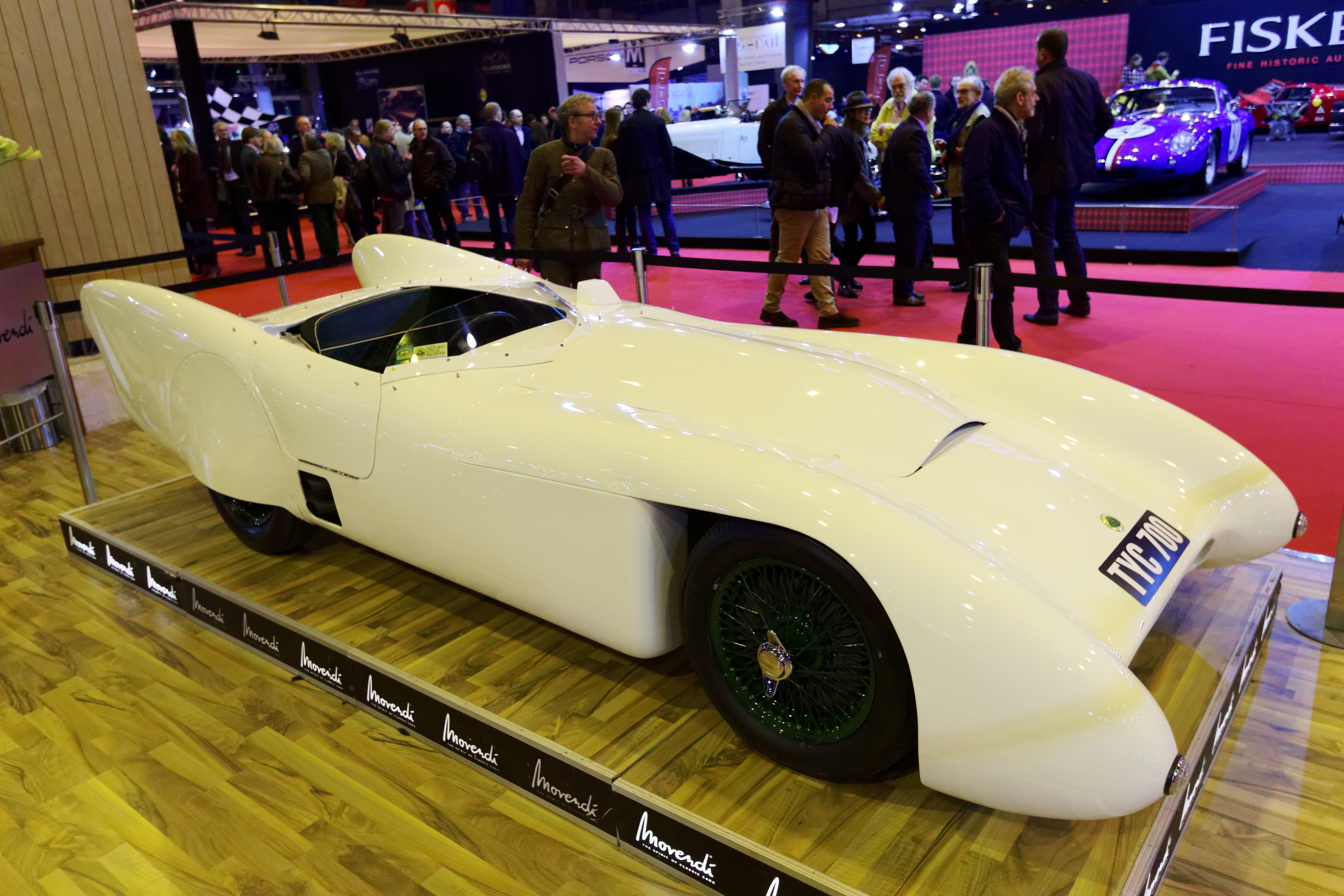 Une Lotus Mk VIII de 1955 exposée lors du salon Rétromobile 2016.